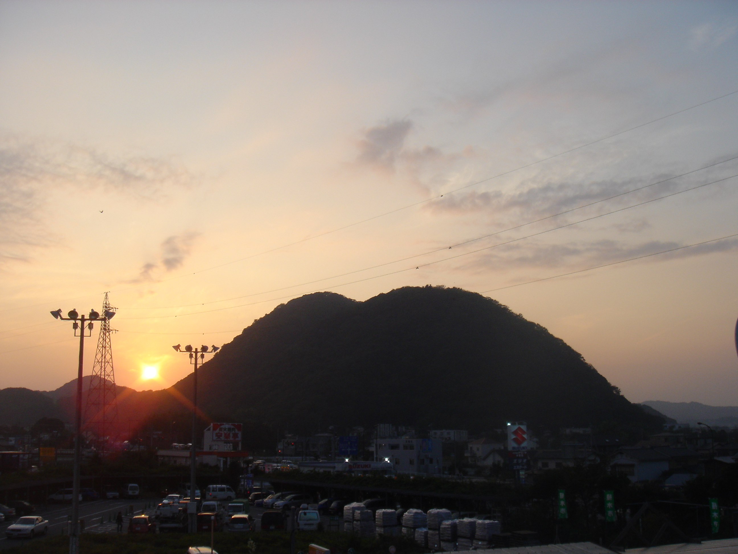 平塚市・大磯町の境にある山。